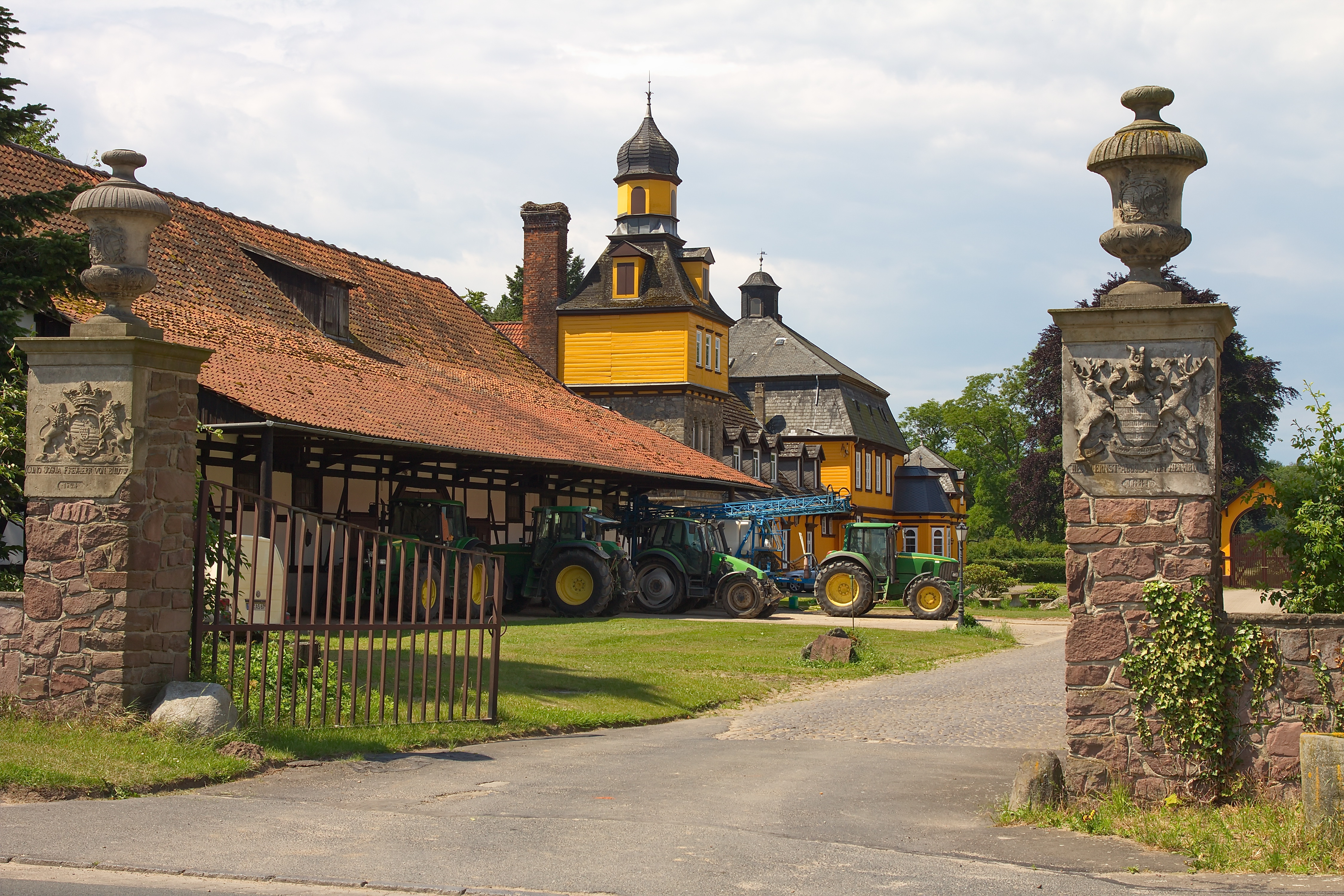 Das Rittergut Abbensen in Abbensen (Edemissen) wird 1279 erstmals als Abbenser Burg erwähnt. Heute ist es ein landwirtschaftlicher Betrieb.